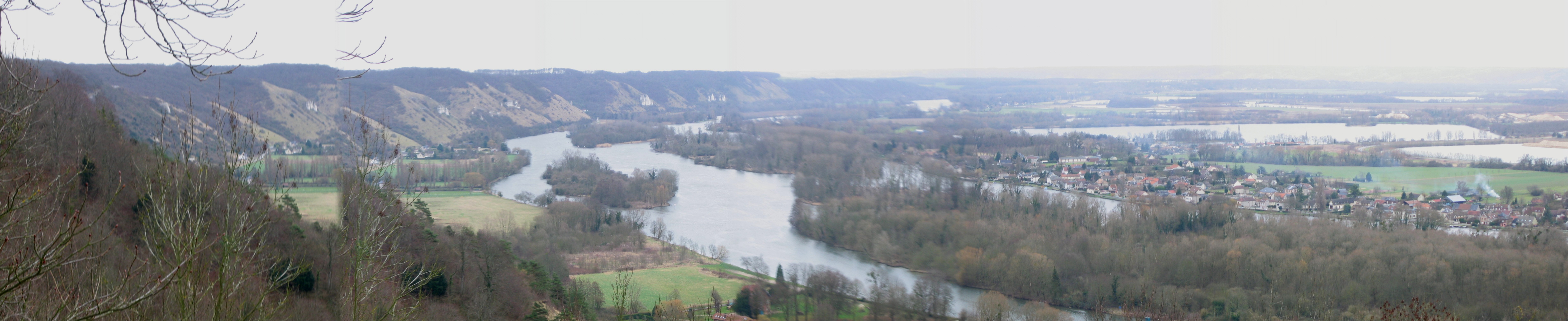 Panoramique sur la côte des Deux-Amants (Eure). La Seine dans la vallée.